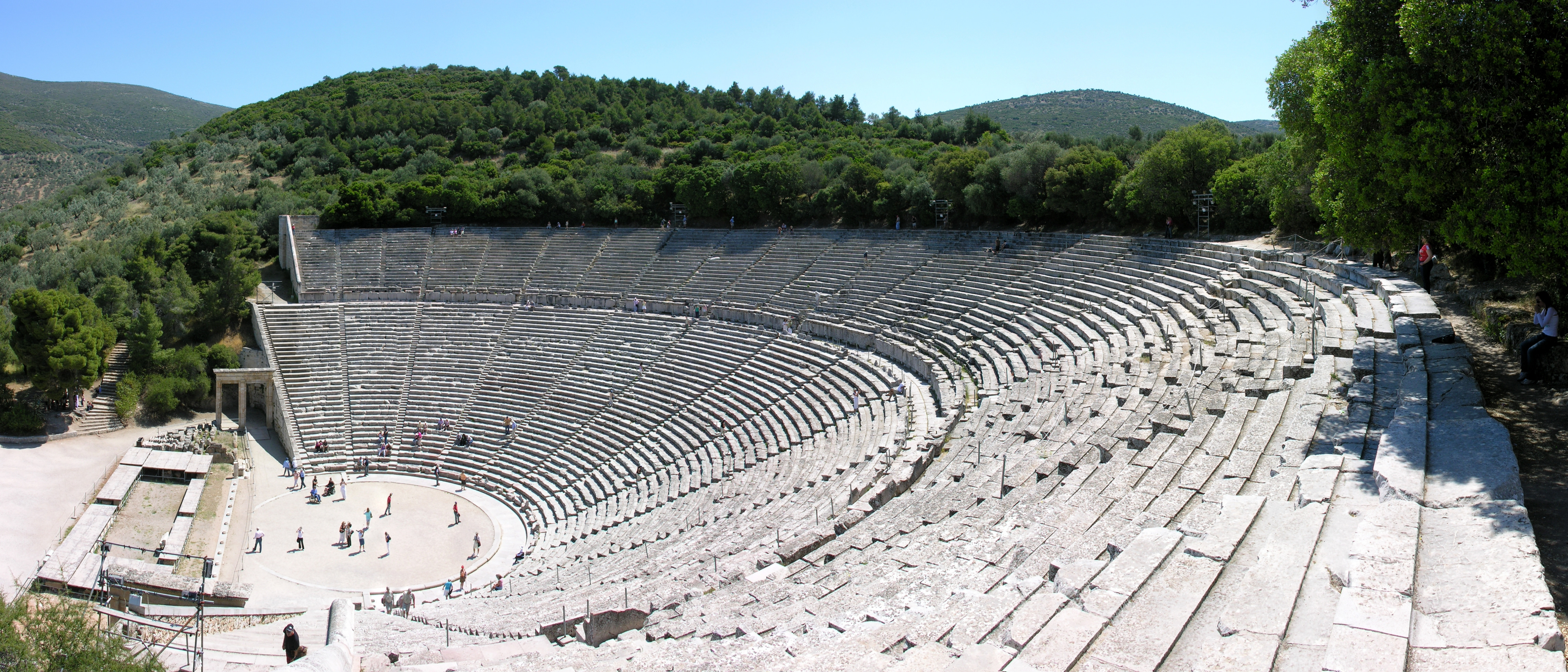 Epidauros